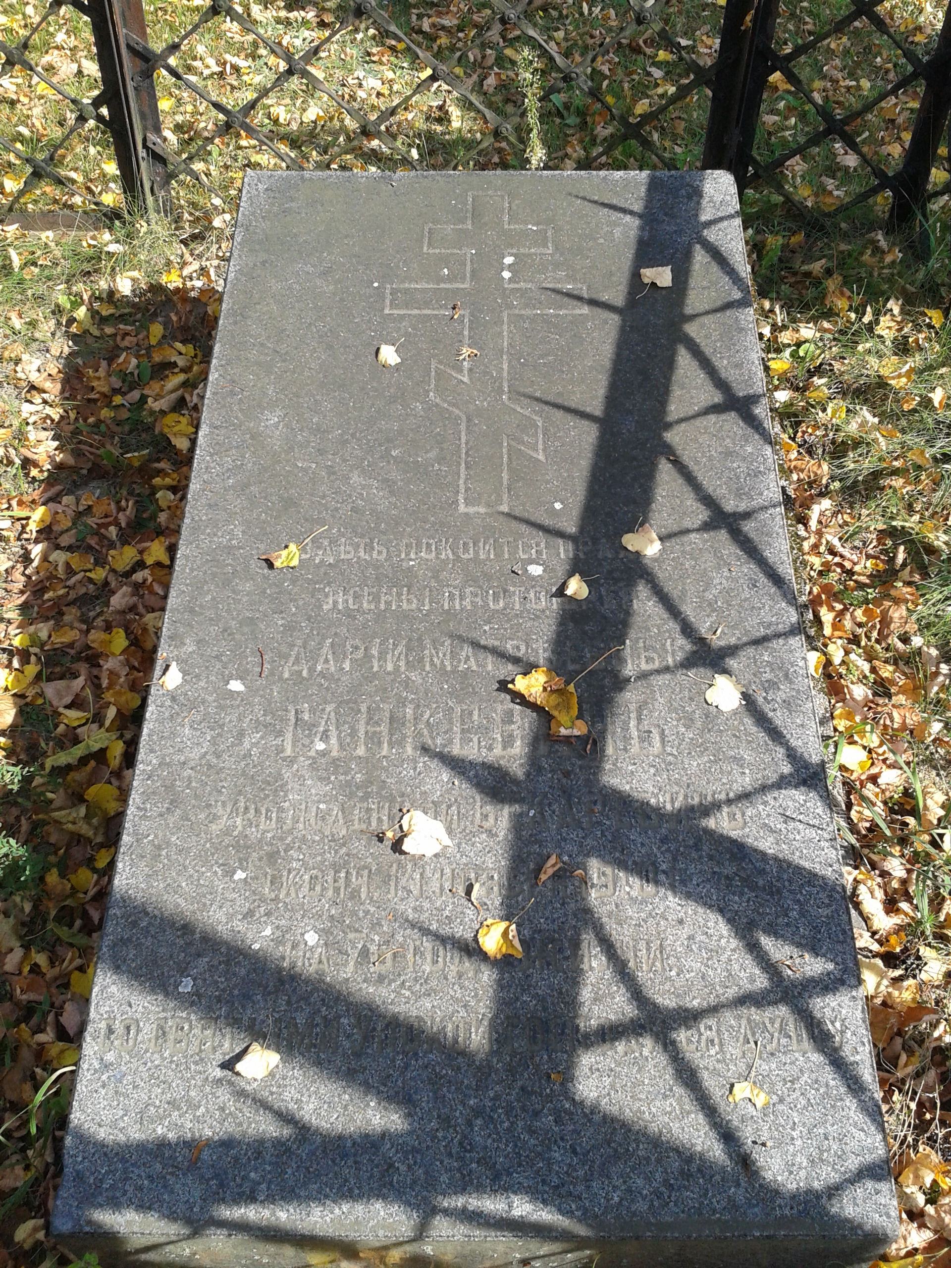 Nagrobek prawosławnej matuszki, małżonki ks. Gankiewicza, z końca XIX w., przy dawnej cerkwi (dziś kościele) w Horbowie